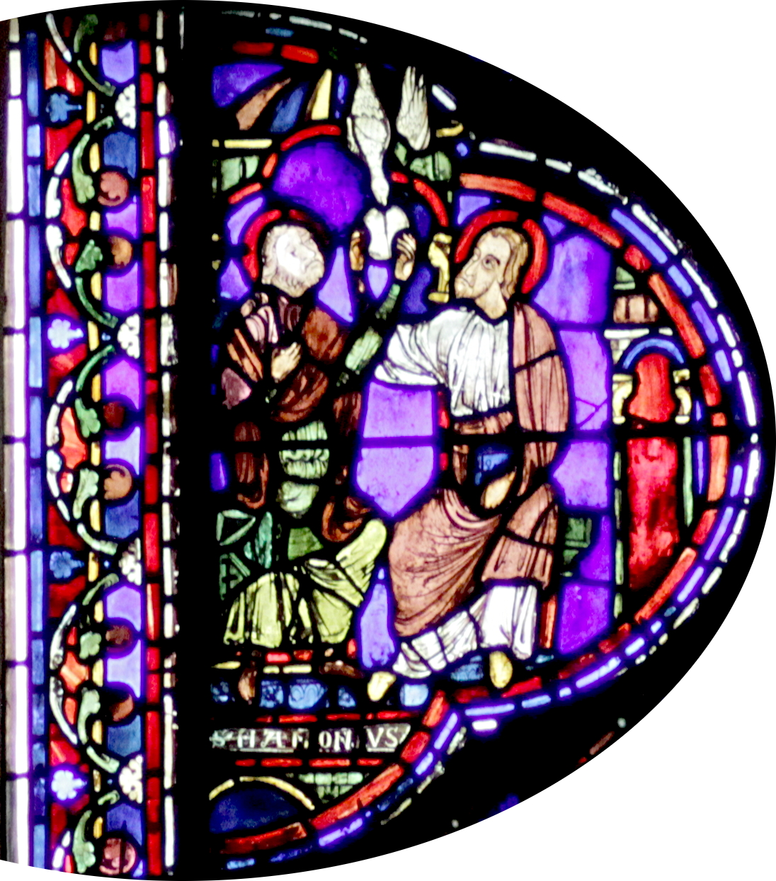 Excerpts from File:Vitrail Chartres-030-d rectifié.jpg